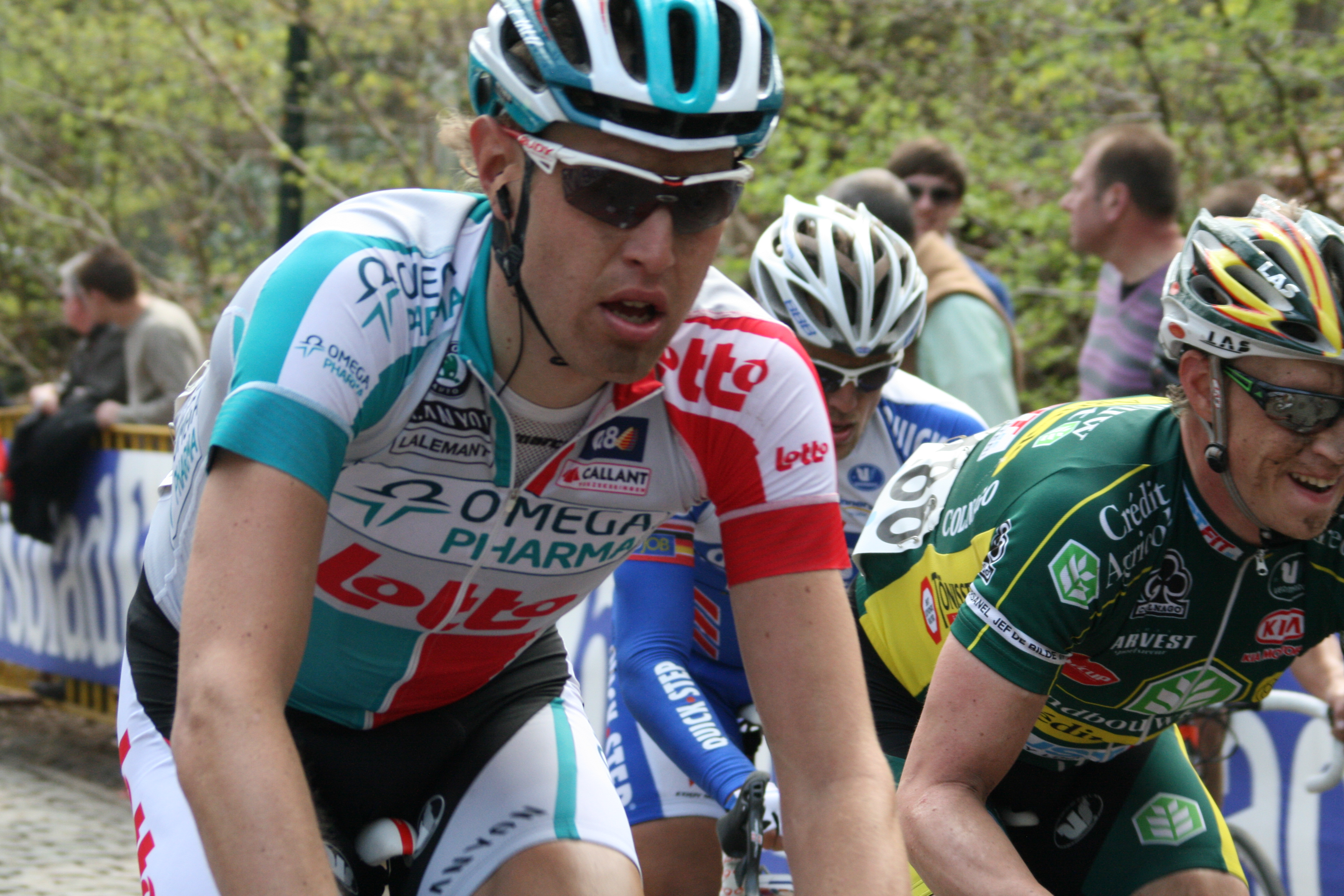 Gent-Wevelgem 2011, Kemmelberg